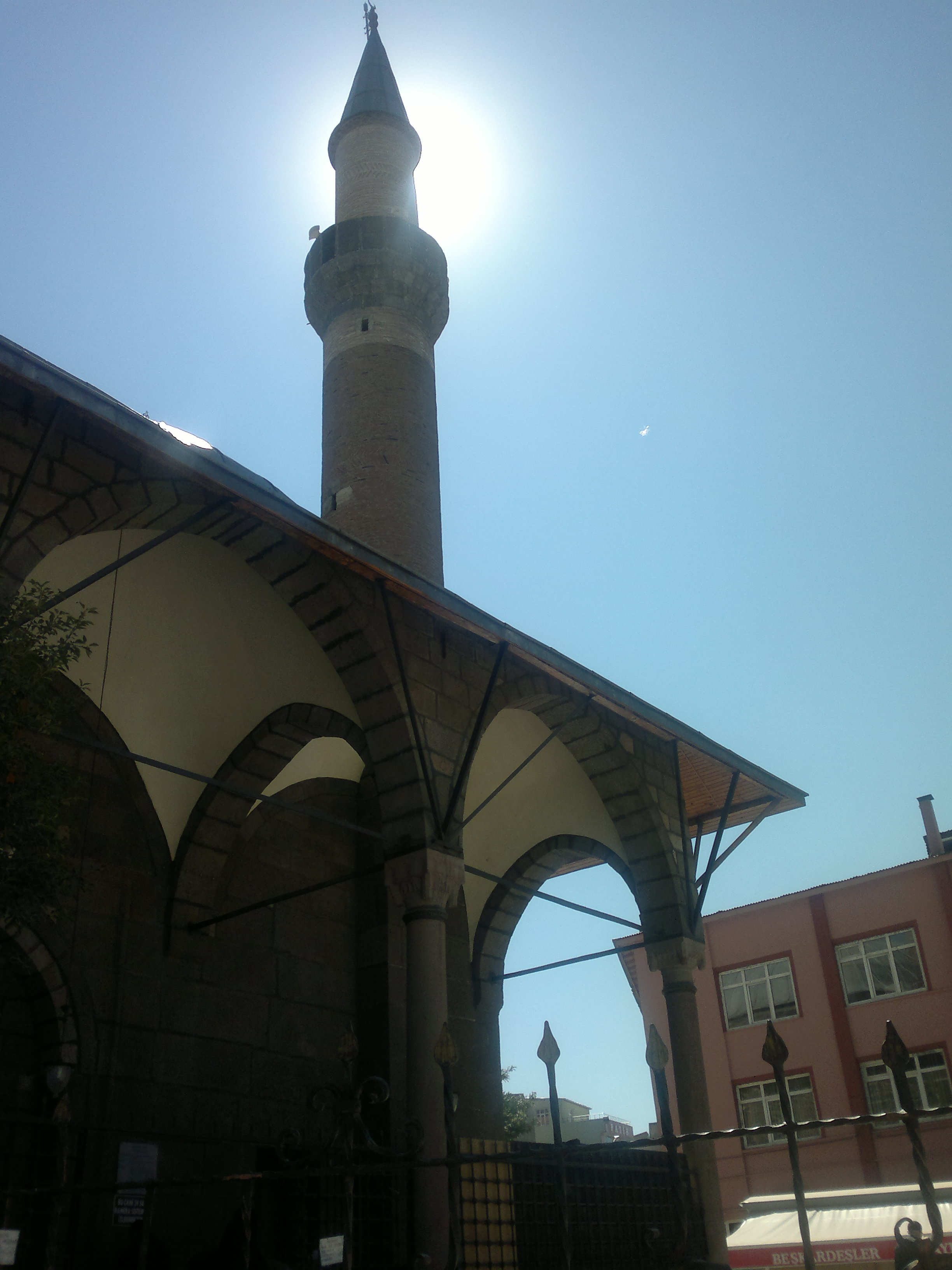 Erzurum Gürcükapı Camii